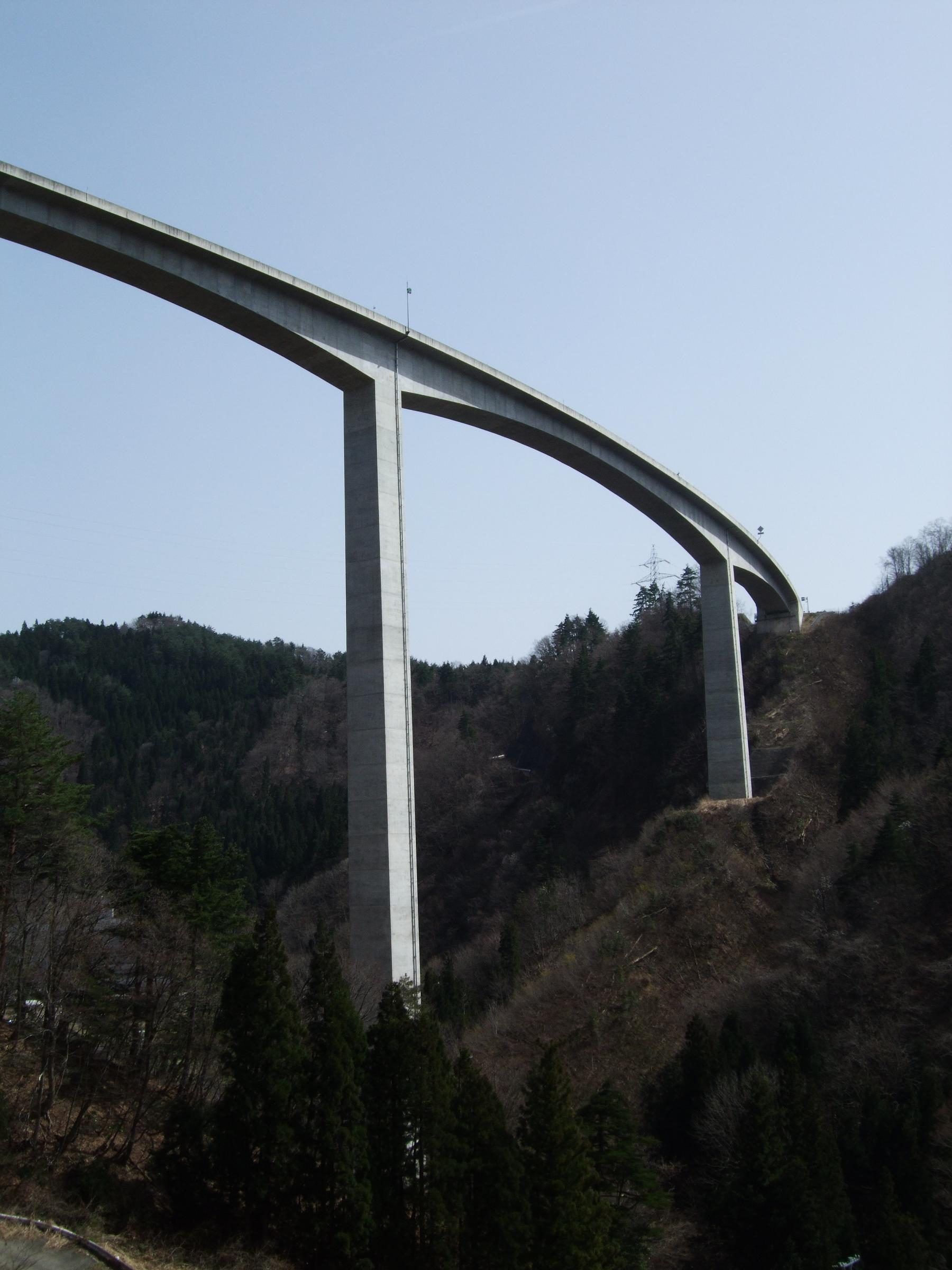 東海北陸自動車道 鷲見橋 2008.4.15 投稿者が撮影